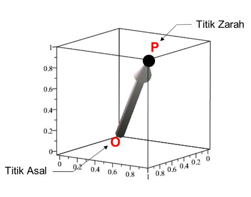 Plot titik zarah dalam koordinat 3 dimensi